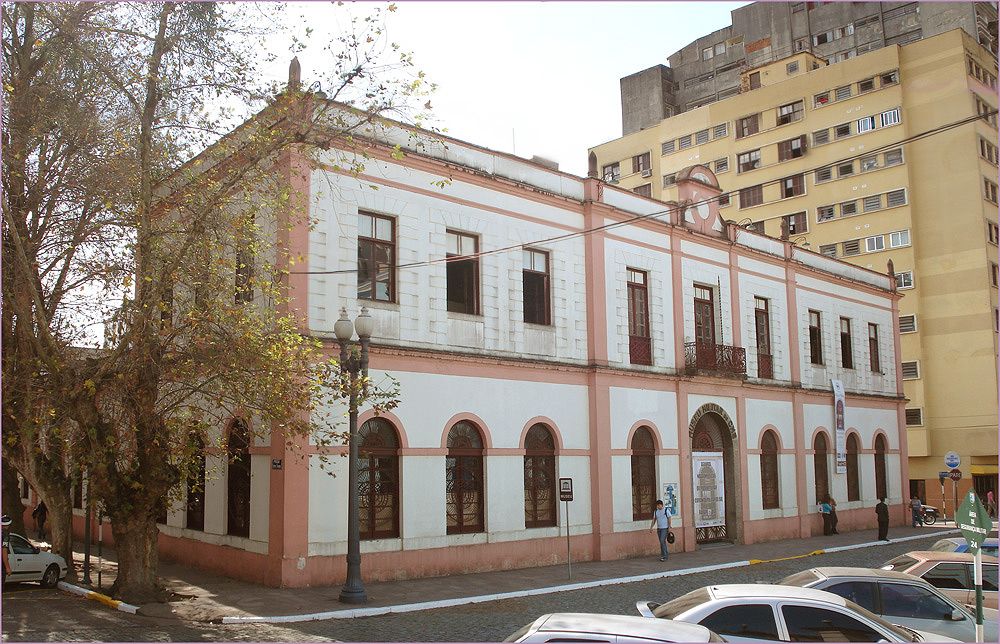 Museu do Comando Militar do Sul, Porto Alegre, Brasil.